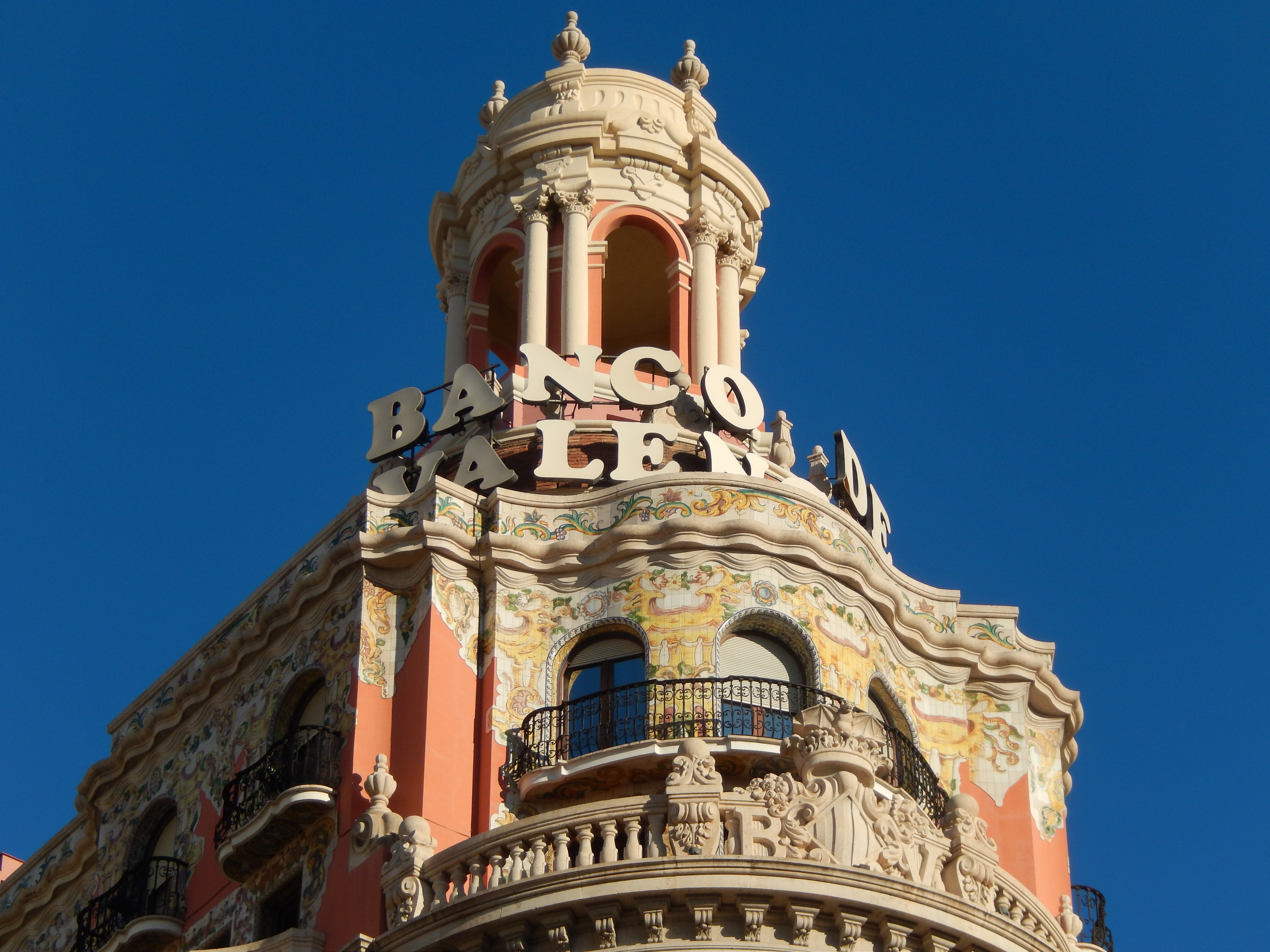 Historisches Bankgebäude im "Modernismo"-Stil am östlichen Ende der Carrer de les Barques in Valencia, Spanien